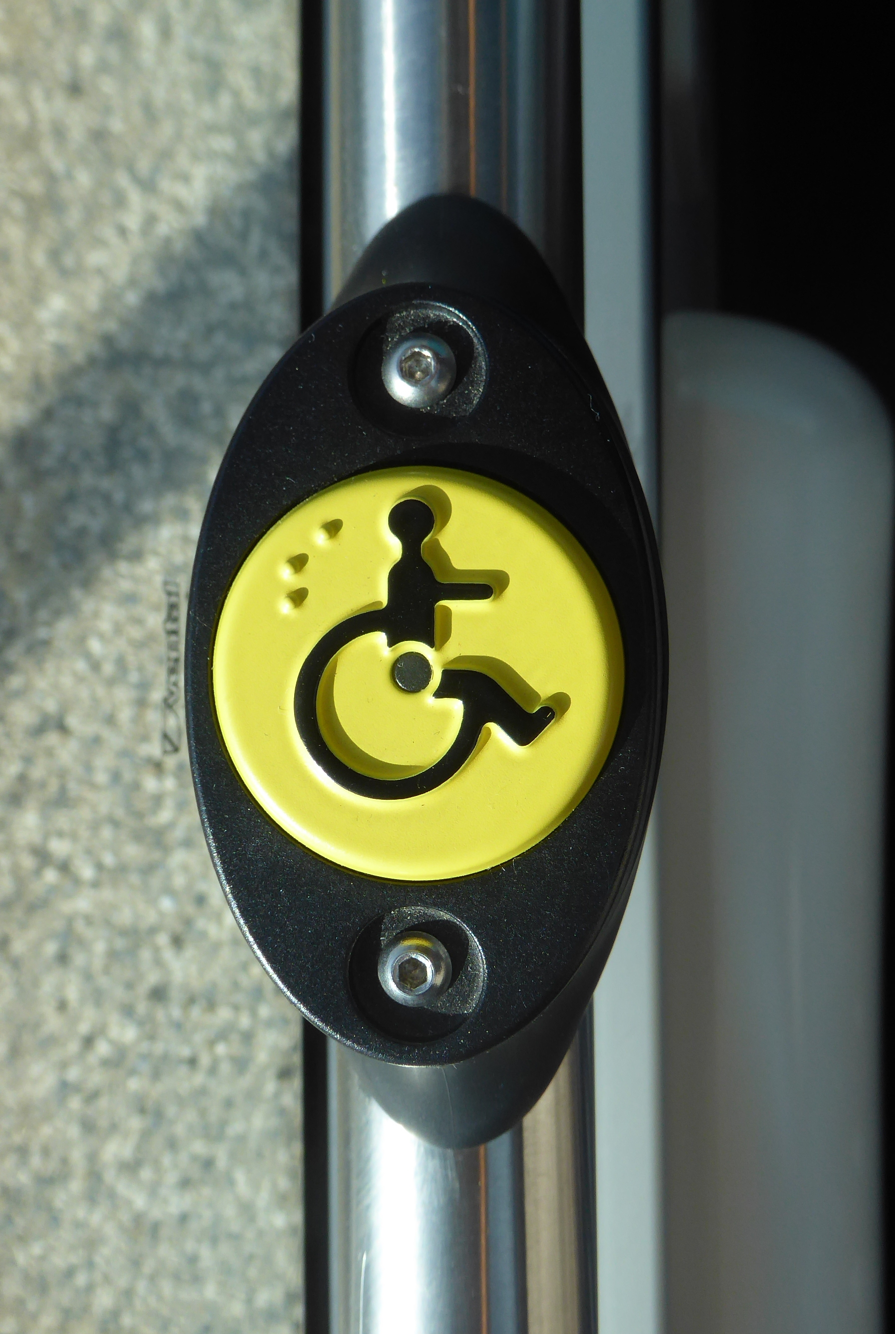 Luxemburg, Haltknopf für Behinderte in einer Straßenbahn, mit einem Braille-S (Stopp?) gekennzeichnet.